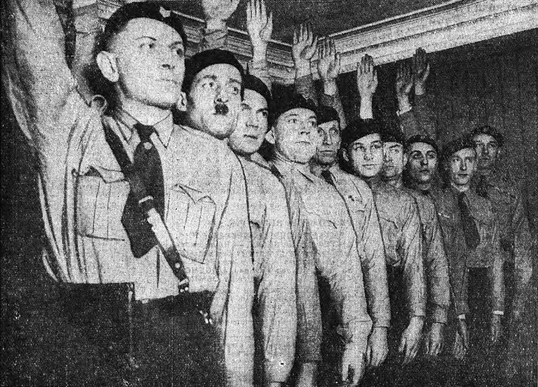 "Jeunes fascistes parisiens (Francistes)"...